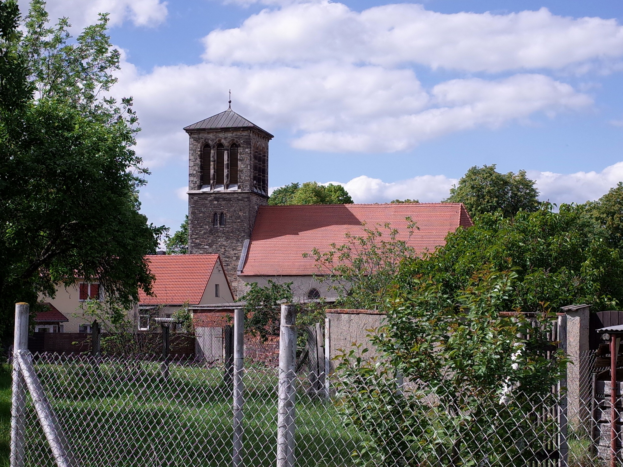 Micheln, Evangelische Kirche St. Nicolai